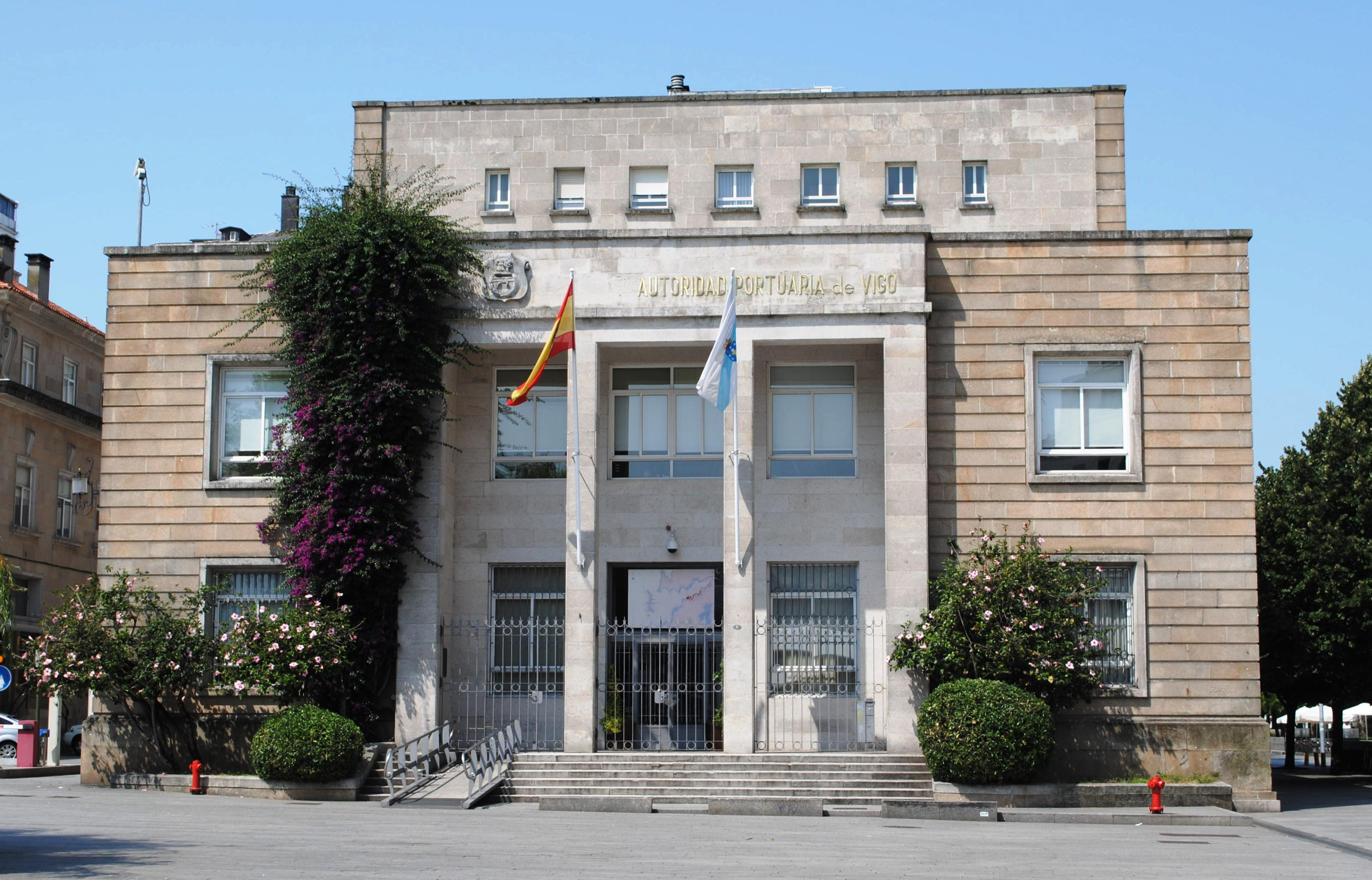 Vexa o título e as categorías.